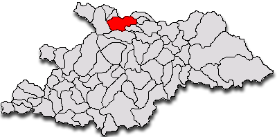 Categorie:Hărţi ale judeţului Maramureş